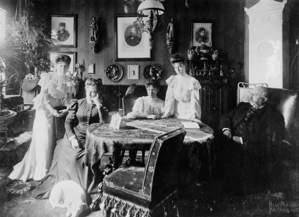 Blick in einen großbürgerlichen Salon